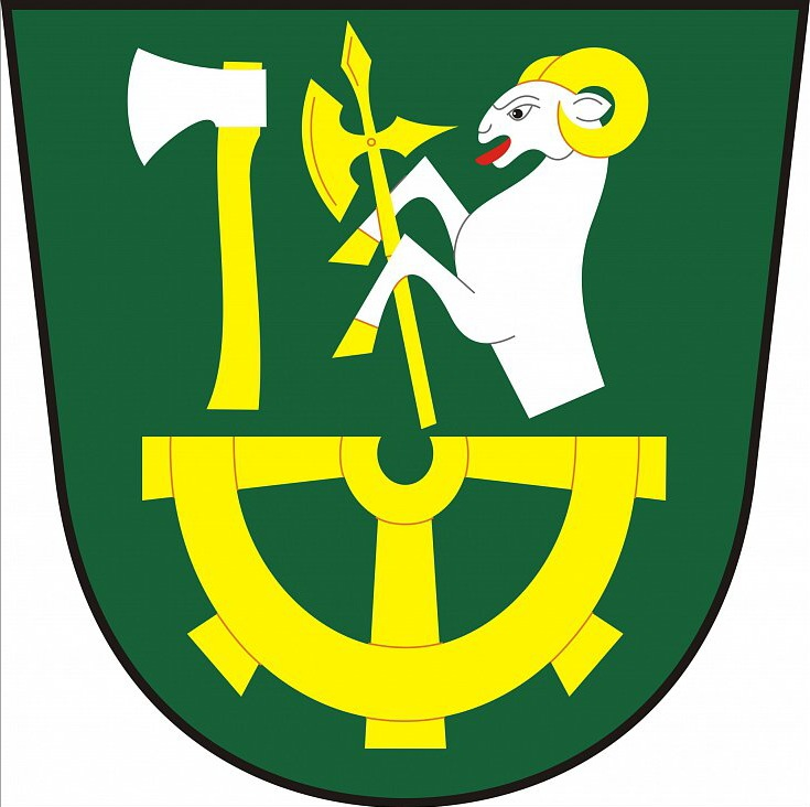 Obecní znak Nové Lhoty v okrese Hodonín